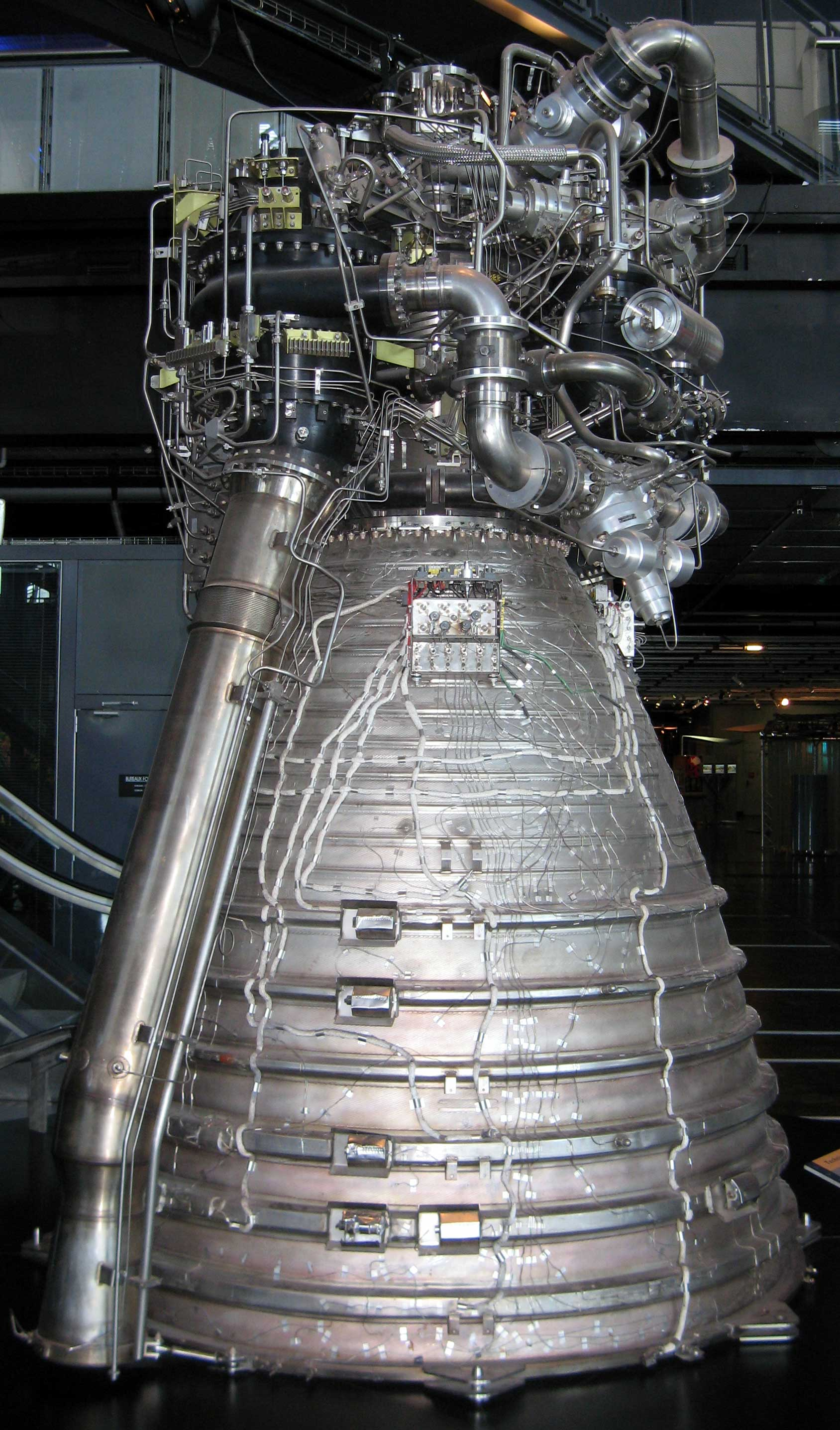 Description : Moteur Vulcain de fusée Ariane V Place : Musée des Sciences et des Techniques de la Villette, Paris, France Date : Juillet 2006 Auteur : Pline Photo personnelle